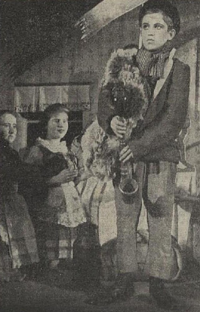 Antonín Jedlička (1923-1993), český herec, bavič, recesista, komik a humorista, imitátor